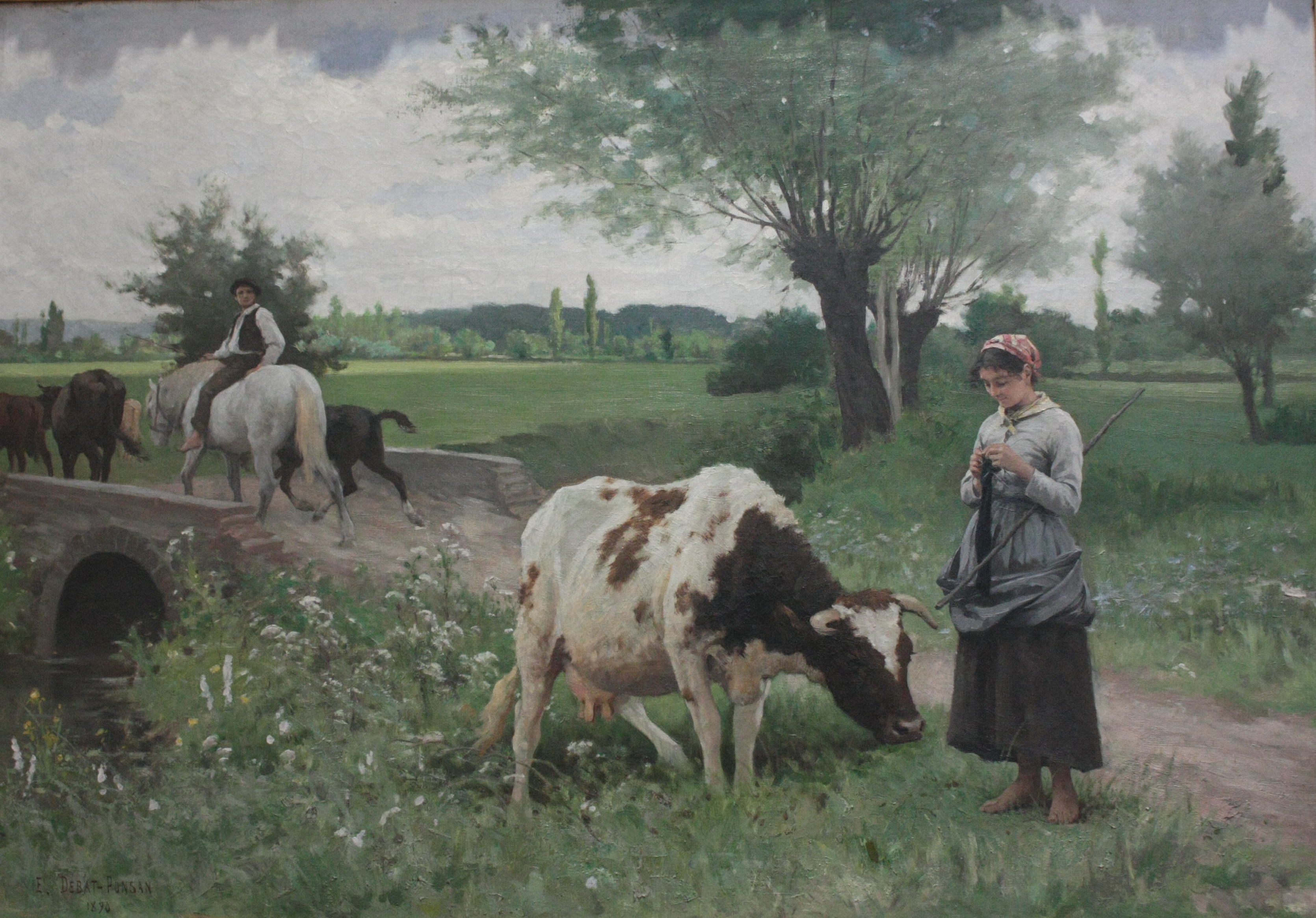 La Vache bien gardée par Édouard Debat-Ponsan